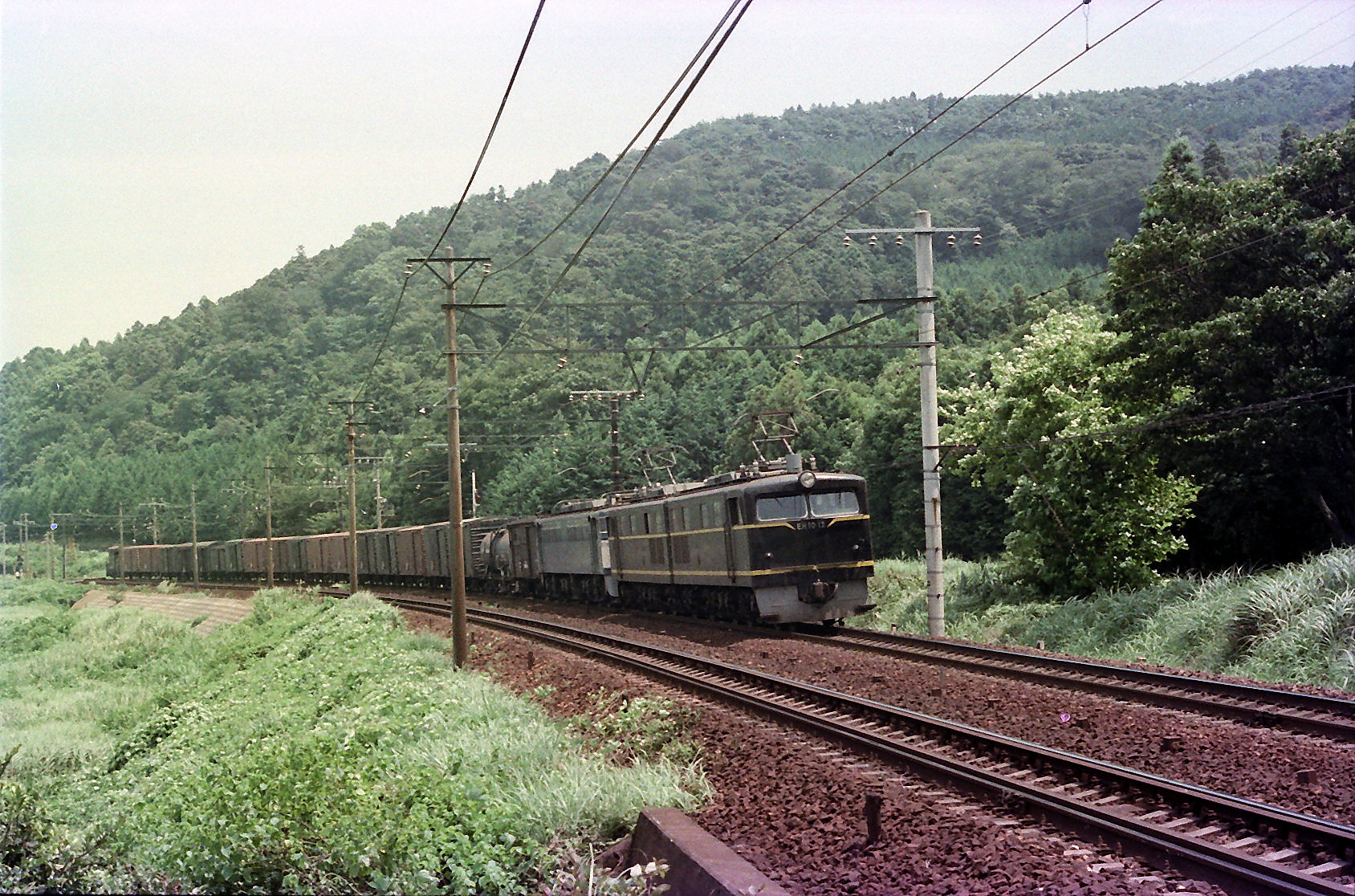 東海道本線 島田駅-金谷駅